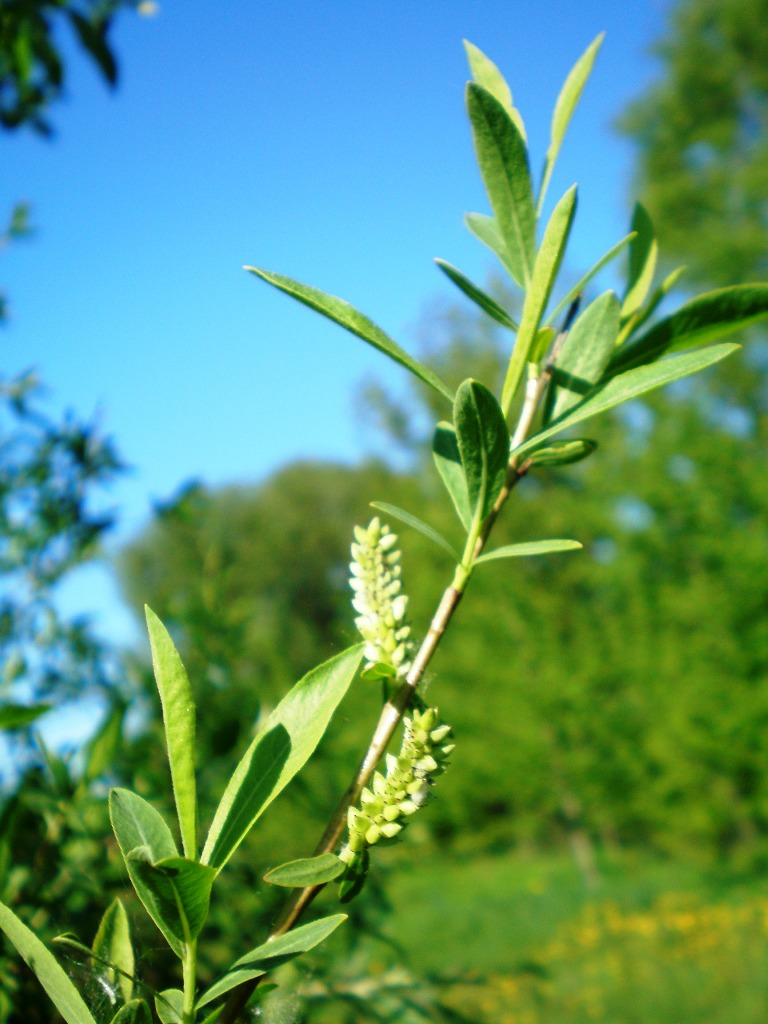 Salix viminalis